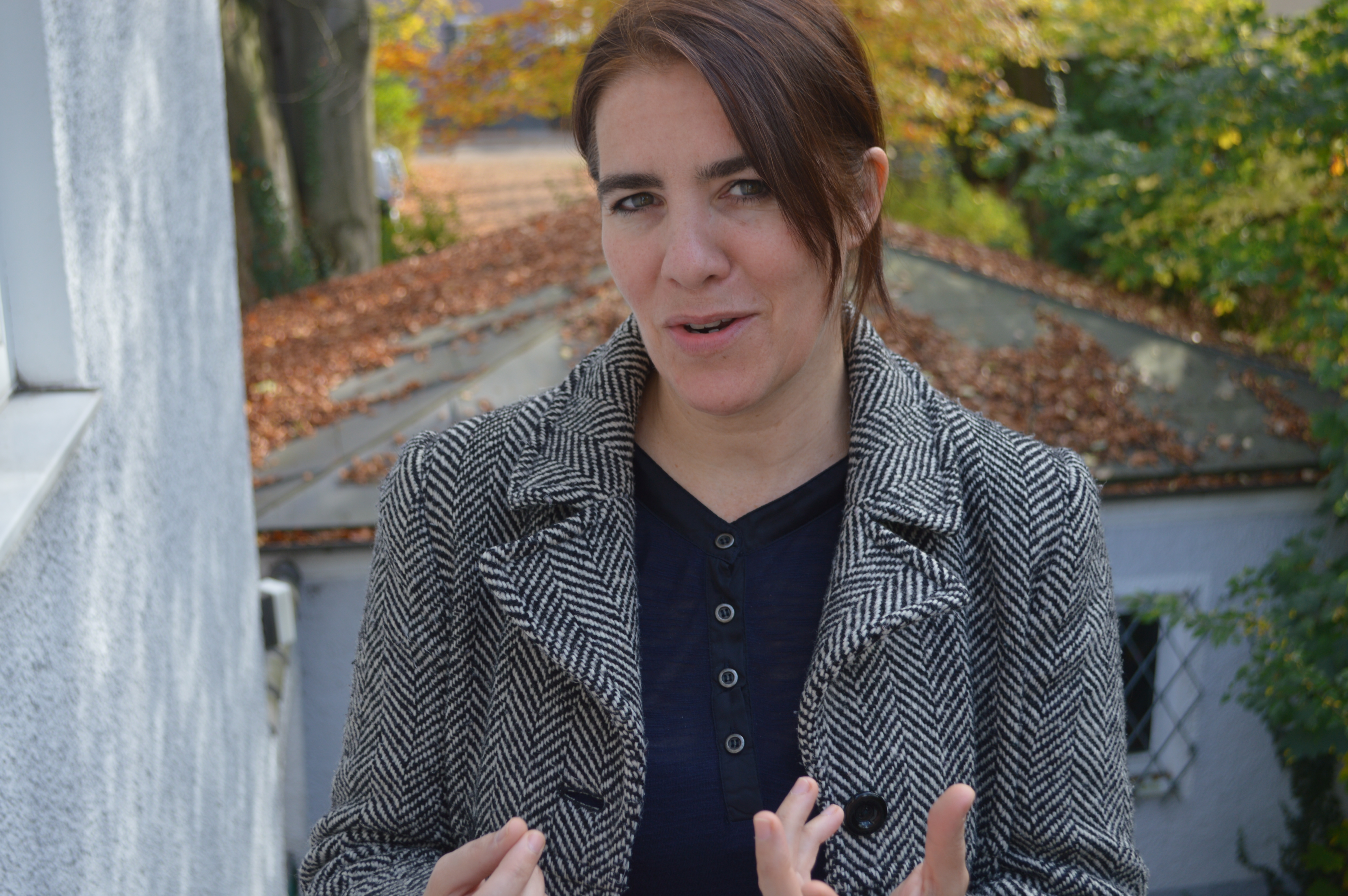 Porträt Karen Breece